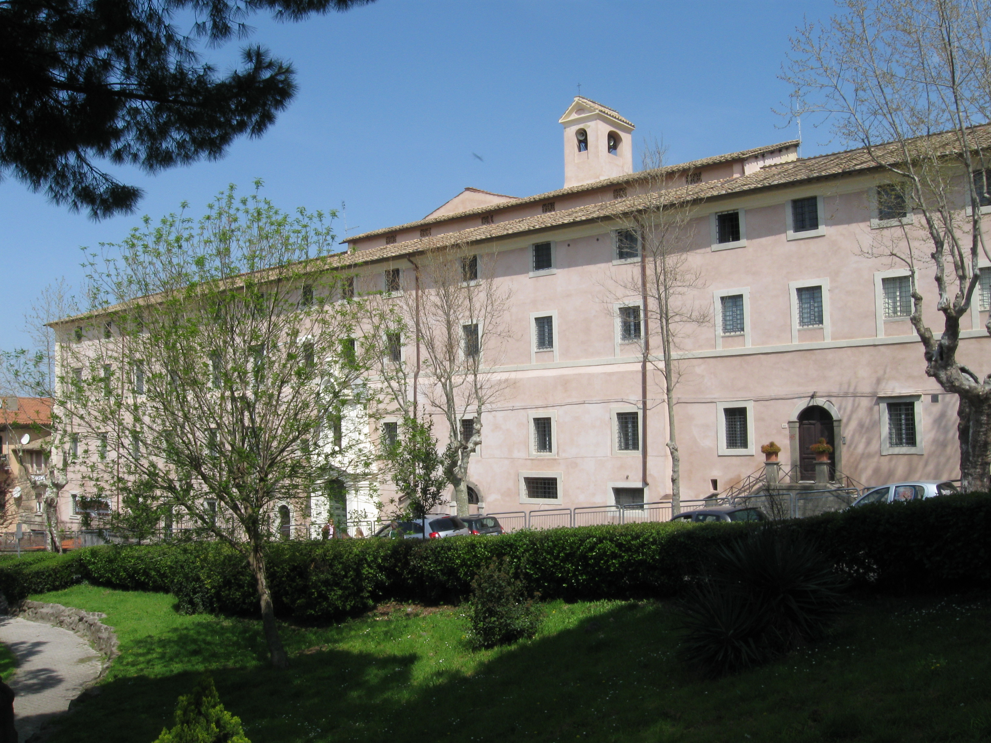 Il convento delle domenicane di clausura del Santissimo Rosario a Marino (RM)